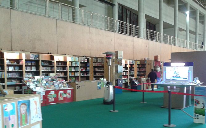 Painel de alguns dos editores presentes no evento